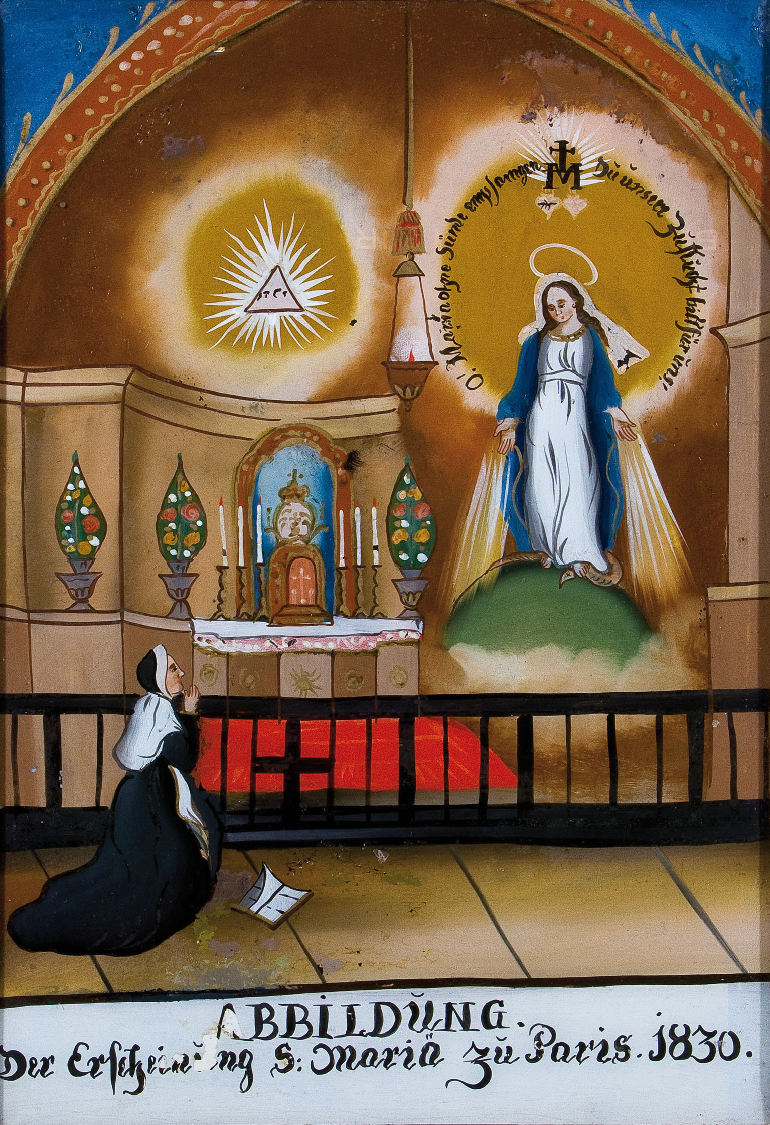 ABBILDUNG. Der Erscheinung S: Mariä zu Paris. 1830 (Katharina Labouré), Hinterglasbild, 34,5 x 26 cm; Mitte 19. Jh.